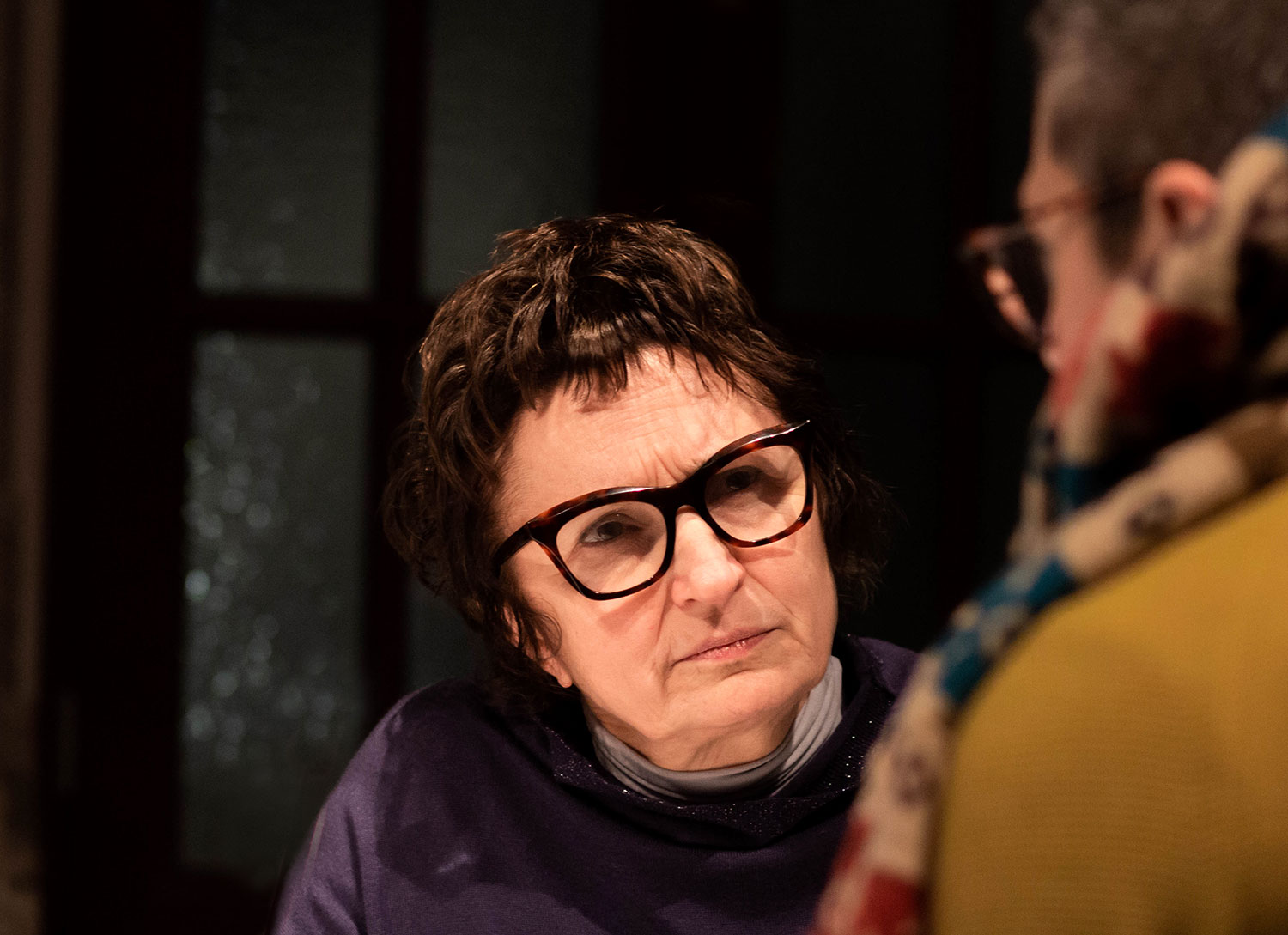 Am 30.Januar 2019 im Literaturhaus Köln. Lesung aus dem Roman „Arminuta“